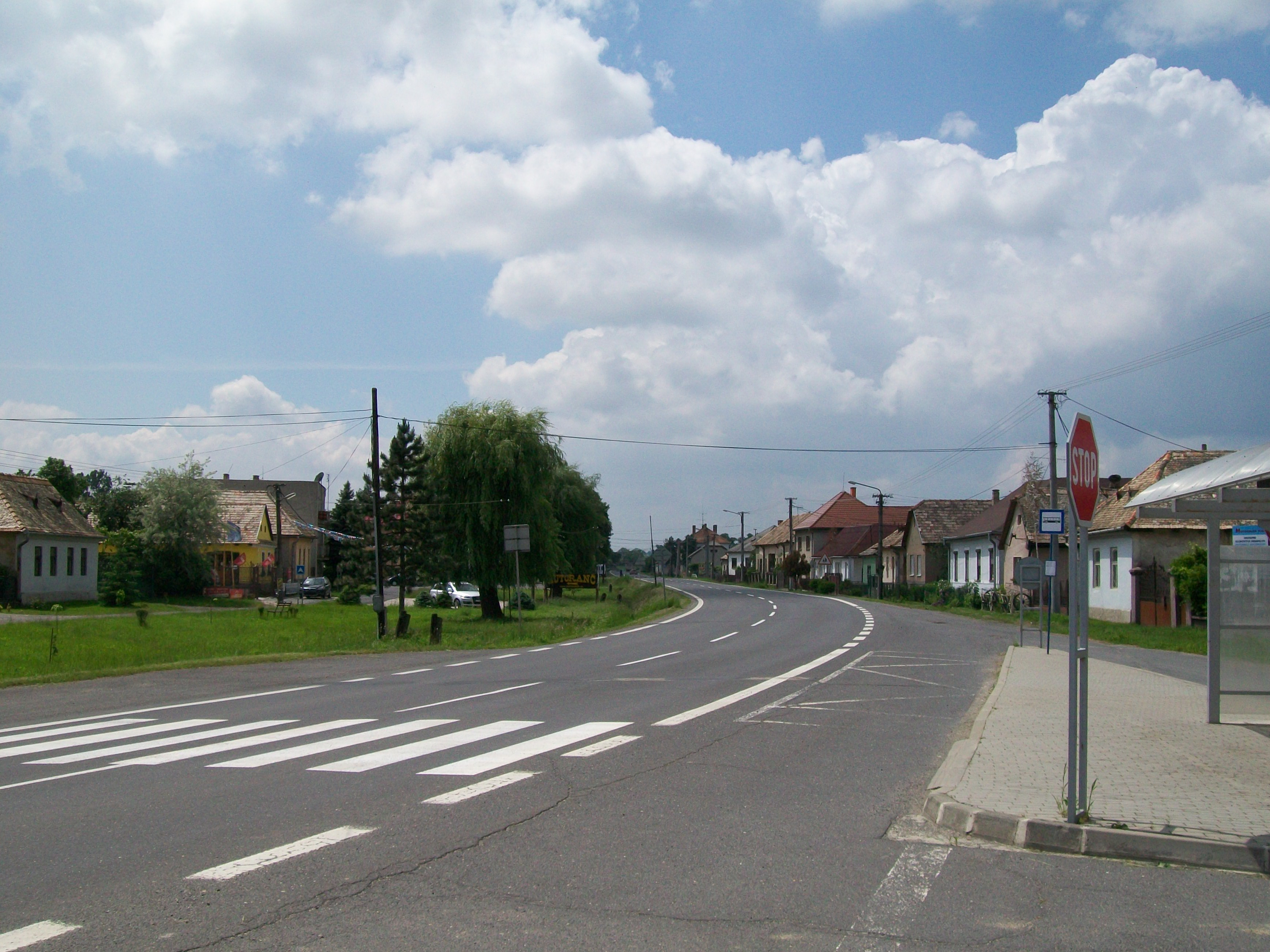 Cesta č.50 - E 571 prechádzajúca cez Pincinú